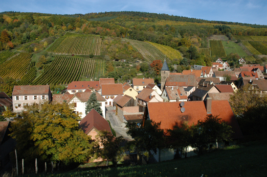 Bernardvillé